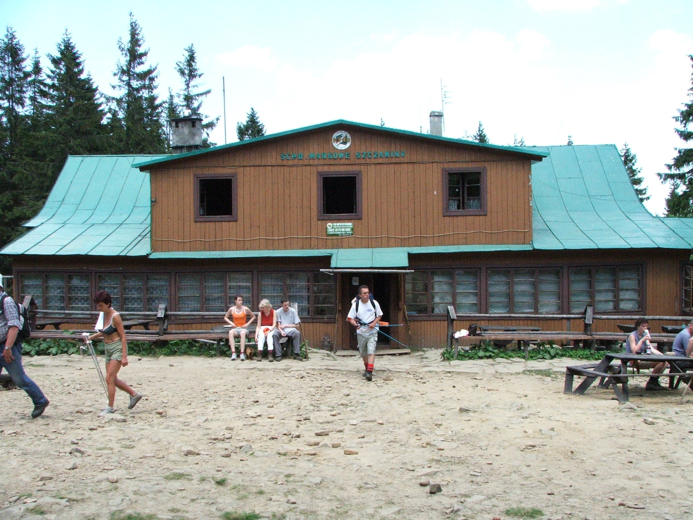 Schronisko na Markowych Szczawinach (dawne, później rozebrane)